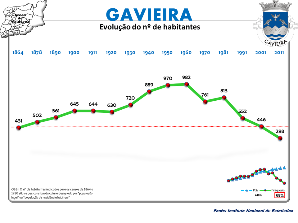 Censos 1864/2011